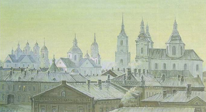 «Умытый город» (на картине изображен Могилёвский Богоявленский братский монастырь в панораме городской застройки).